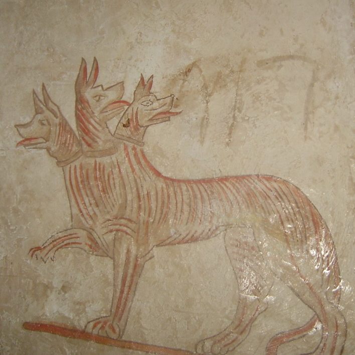 ציור קיר של קרברוס בבית גוברין - מראשה.